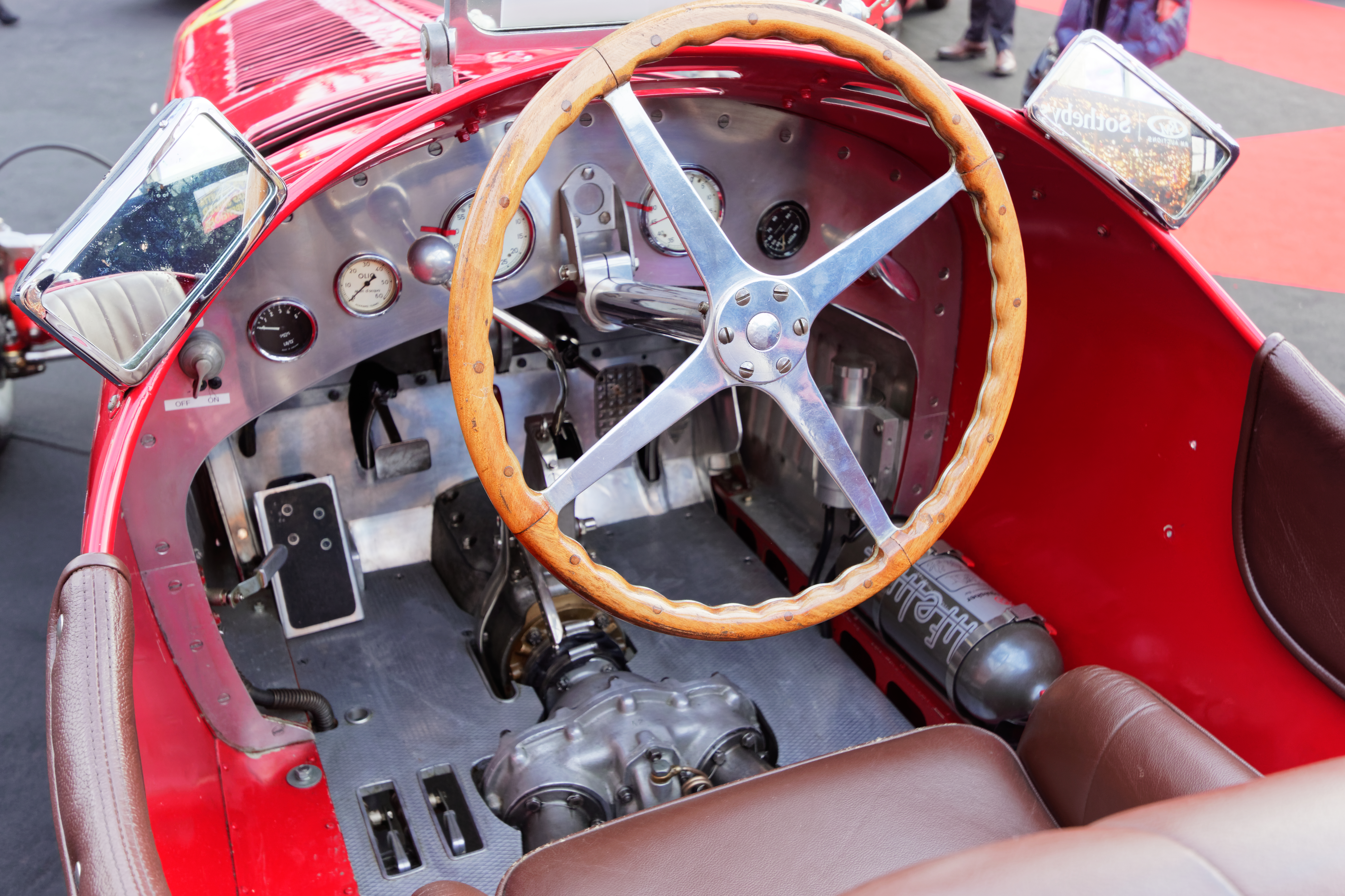 Une Alfa Romeo Tipo B P3 de 1934 exposée lors de la vente RM Sotheby’s 2017 aux Invalides à Paris.